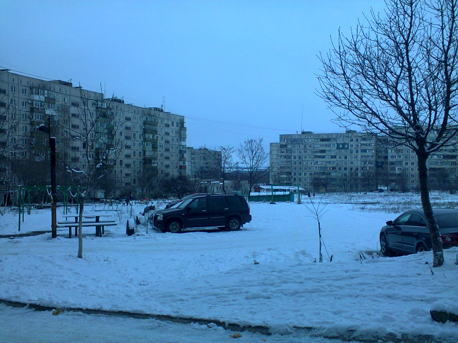 23 МКР Мариуполя